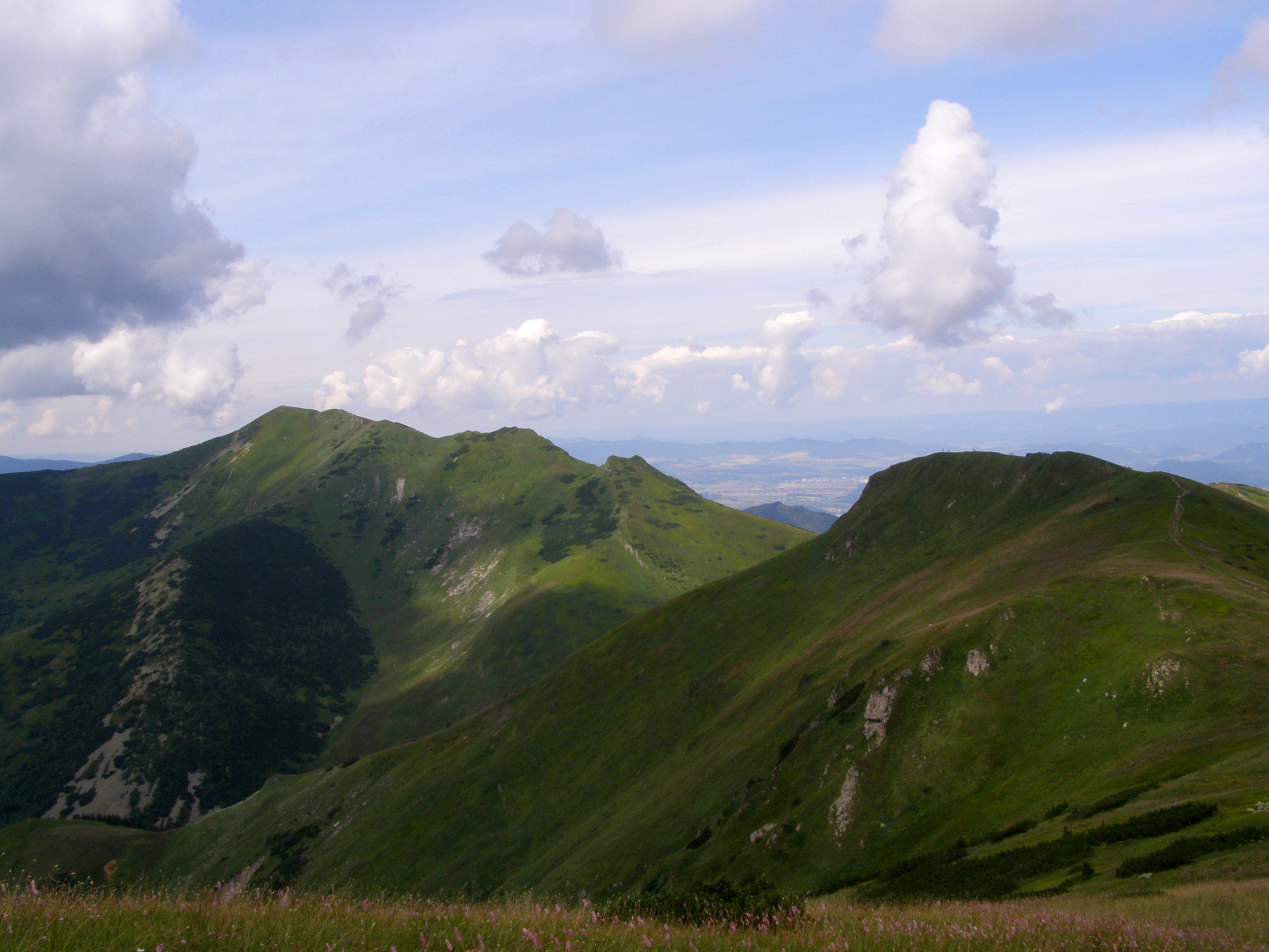 Krivánská Malá Fatra, vpravo Malý Kriváň (1671 m), vlevo Pekelník (1609 m), pohled z úbočí Velkého Kriváně